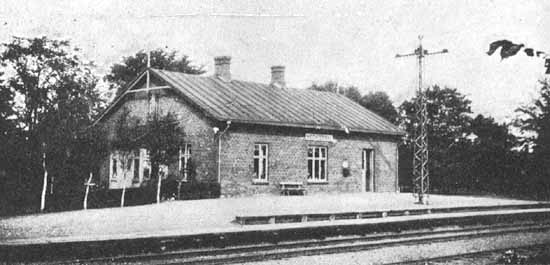 Hedvigsdal railway station at Ystad-Gärsnäs-S:t Olofs Järnväg in Sweden